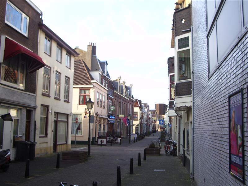 De Willemstraat in Wijk C in de stad Utrecht The Willemstraat in Wijk C in the city of Utrecht, Netherlands